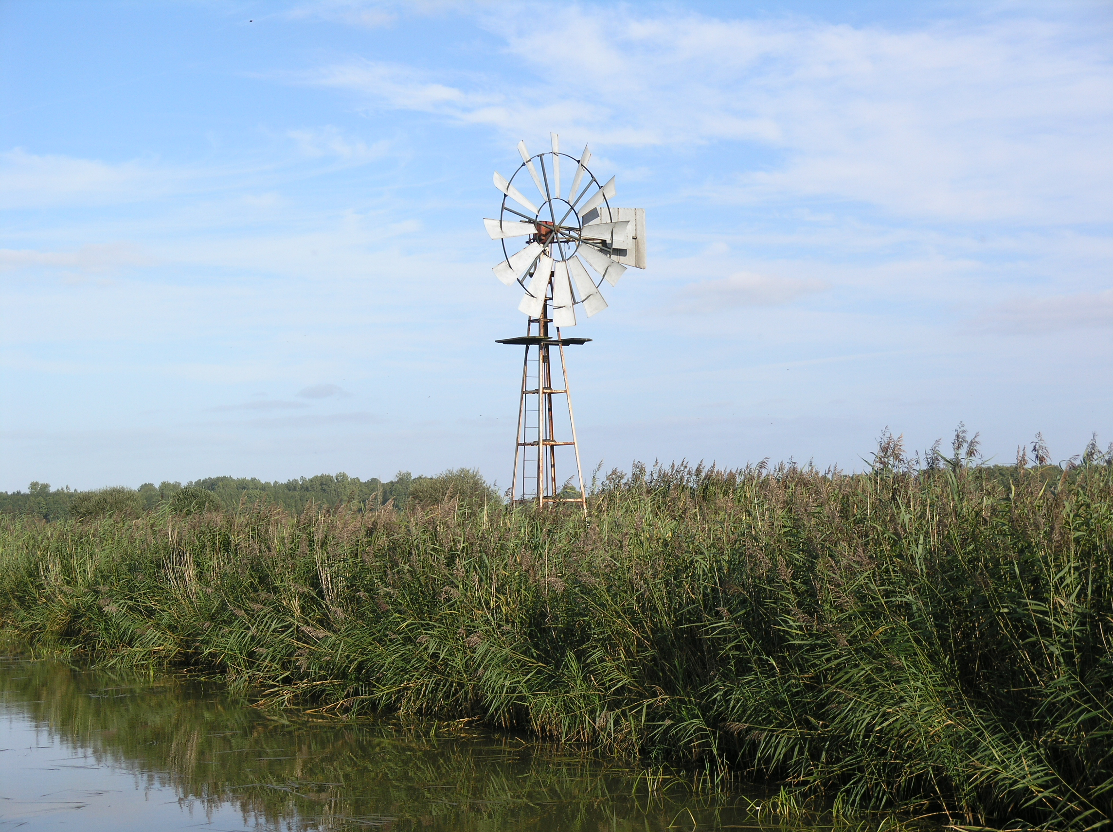 Oldeberkoop Windmotor Poldermolen